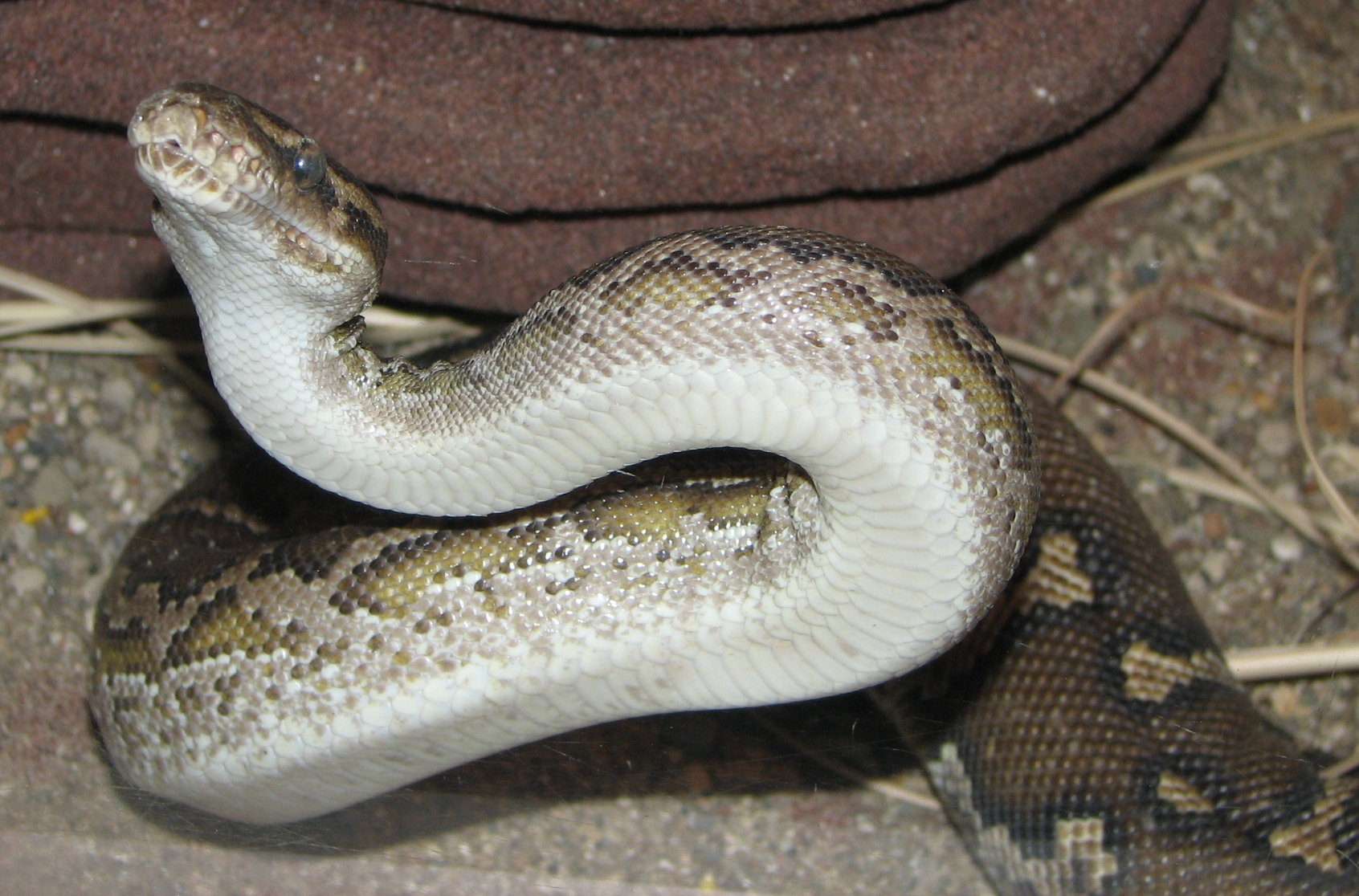 Python anchietae (Angolian Python)